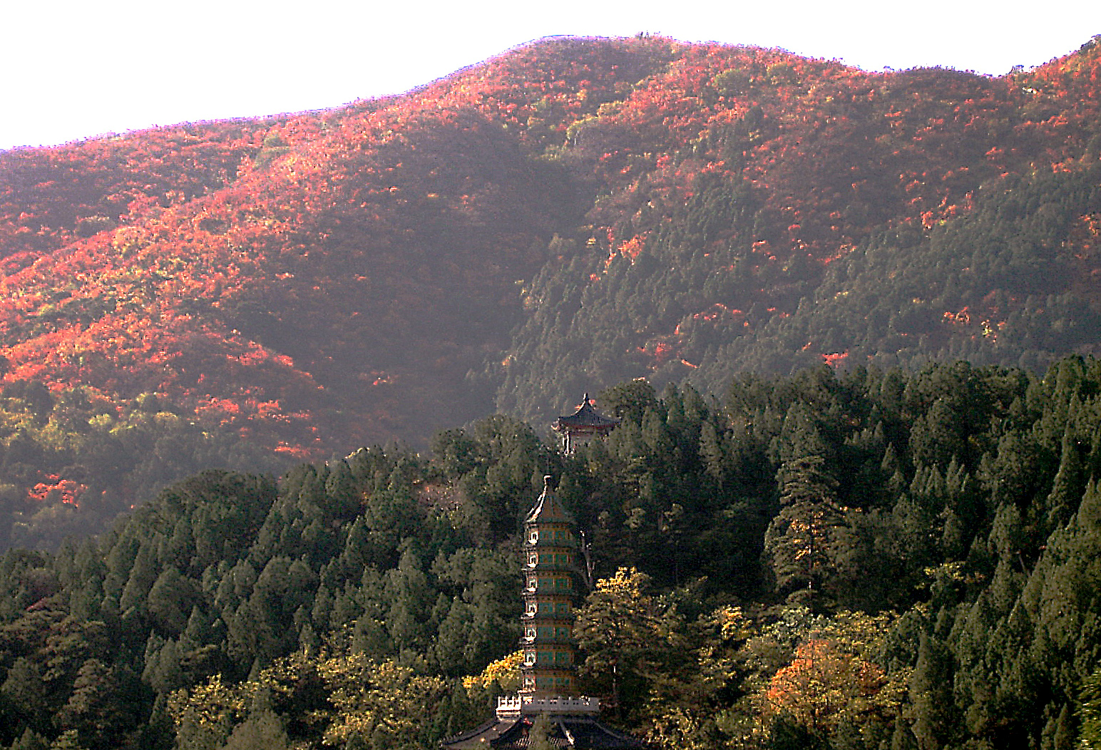 北京，香山红叶